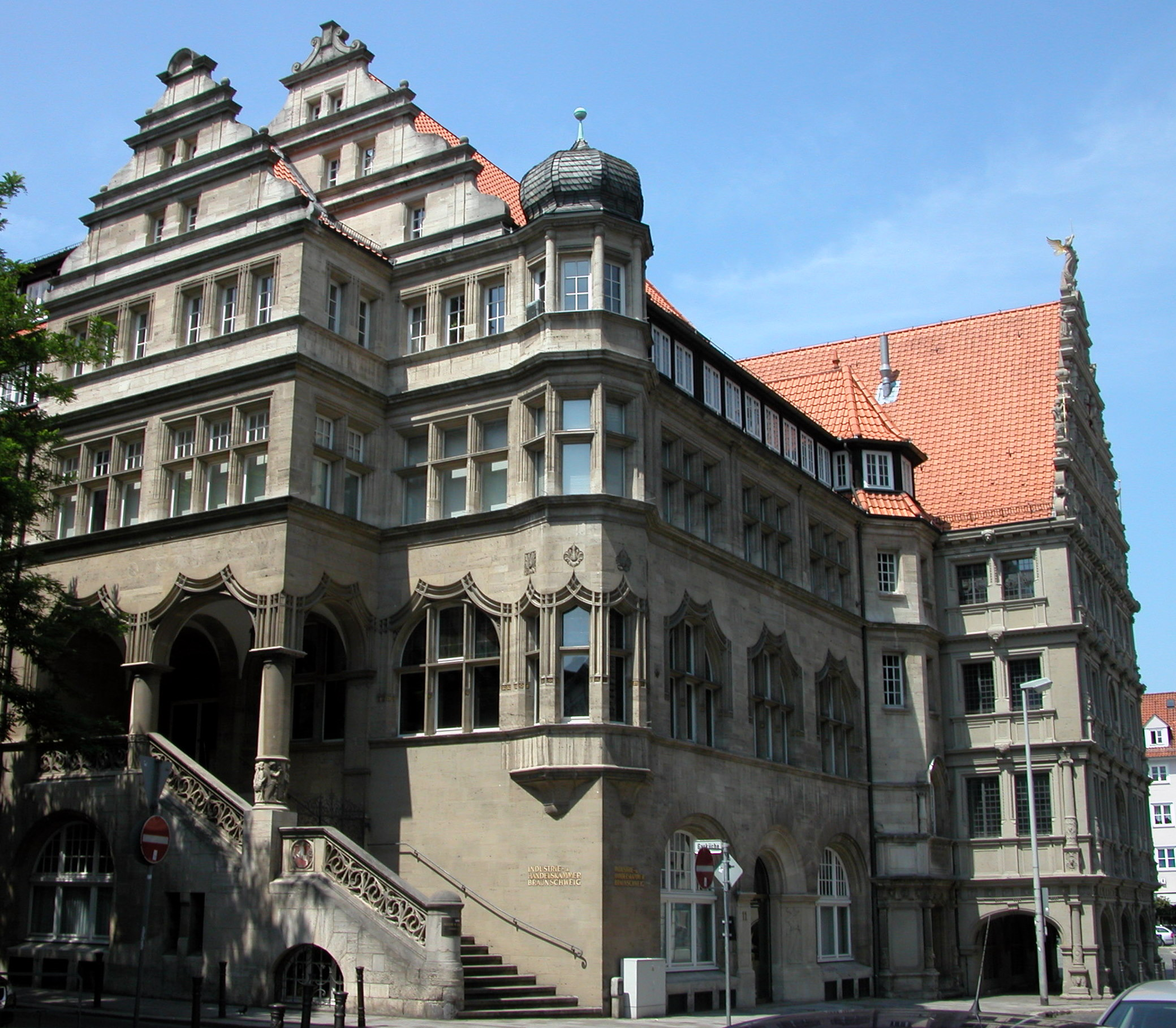 Braunschweig: Im Vordergrund die Südostseite der Industrie- und Handelskammer, rechts daneben die Ostfassade des Gewandhauses.